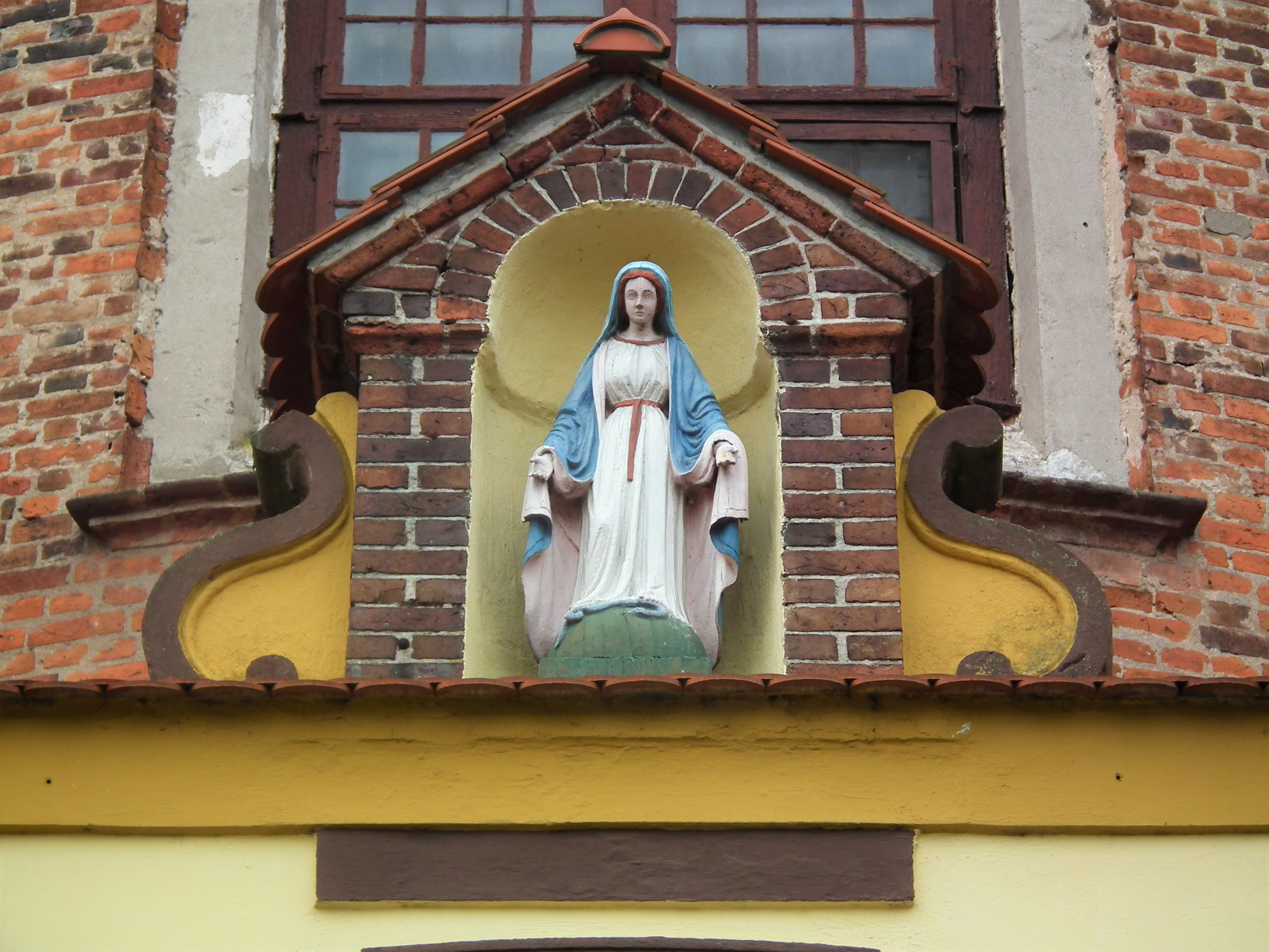 Otoczenie kościoła Wszystkich Świętych w Starym Białczu.